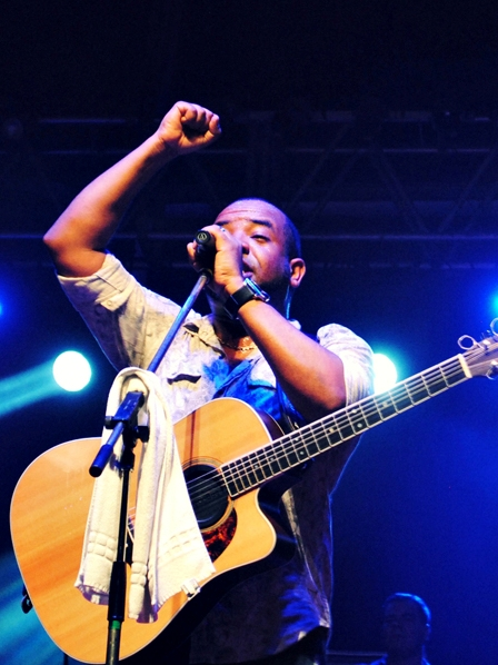 Luiz Arcanjo, vocalista do Trazendo a Arca durante o Jesus Vida Verão 2012. Imagem fotografada por Marcus Melo.